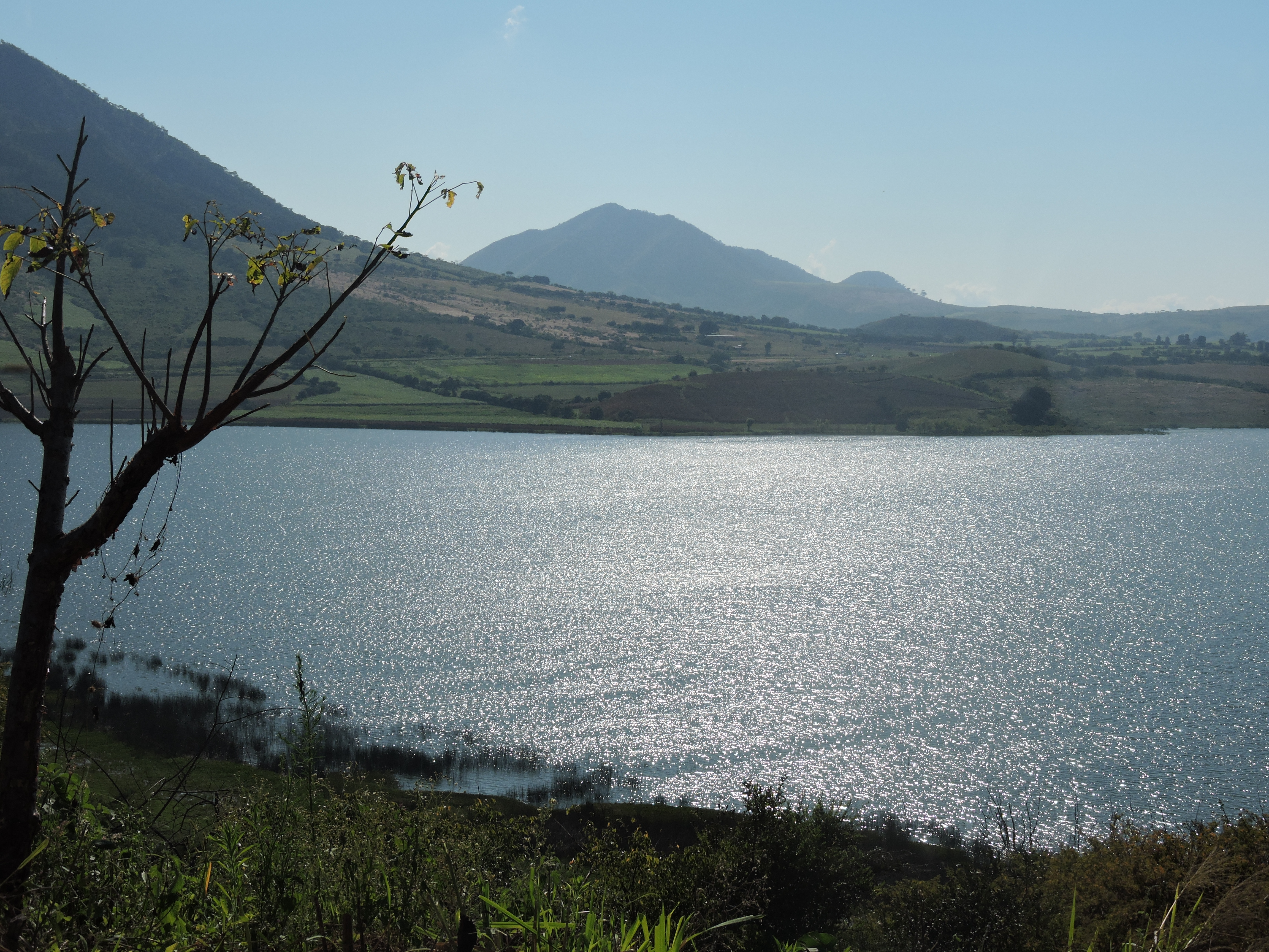 una foto de la laguna de San Pedro